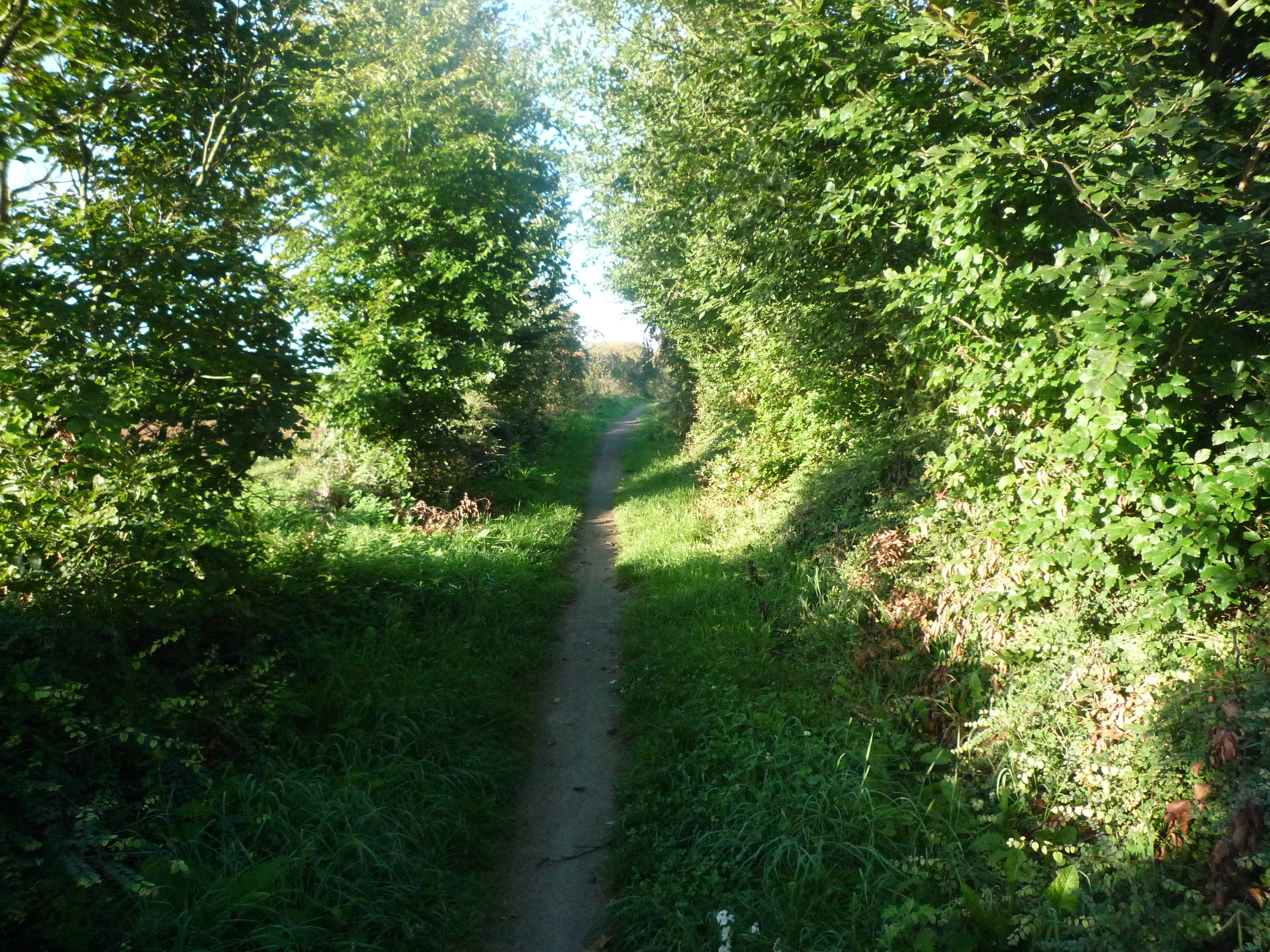 L'embranchement ferroviaire de la fosse Lambrecht part du sud de la Fosse Audiffret Pasquier à Escaudain et rejoint la Fosse Lambrecht au sud de Wallers. Sa longueur est d'environ 2700 mètres. Il prend naissance non loin de l'ancienne Gare d'Escaudain, sur la ligne Somain - Péruwelz. L'image est ici prise à partir du sommet du terril Audiffret Sud.